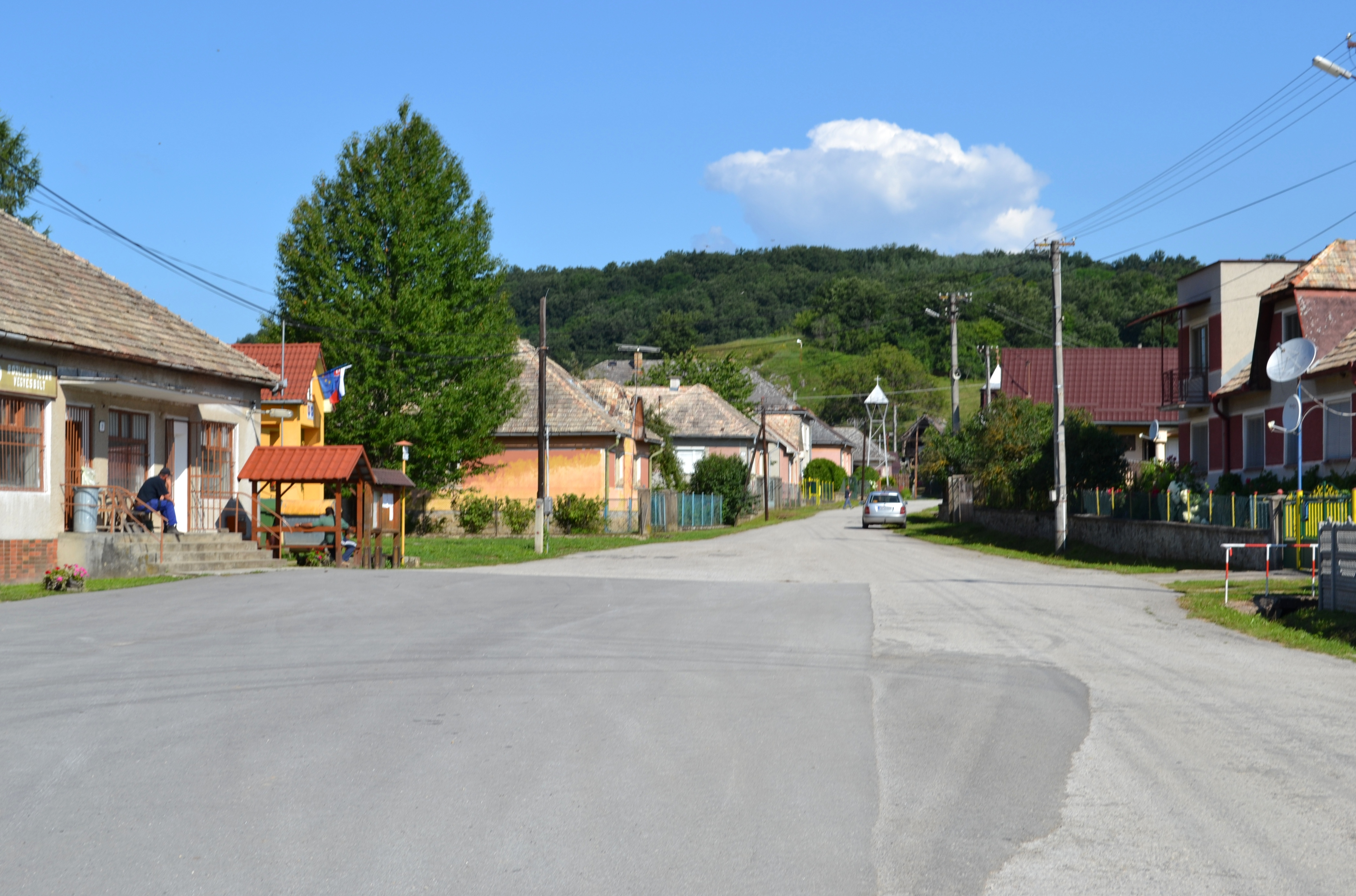 Obec Chvalová